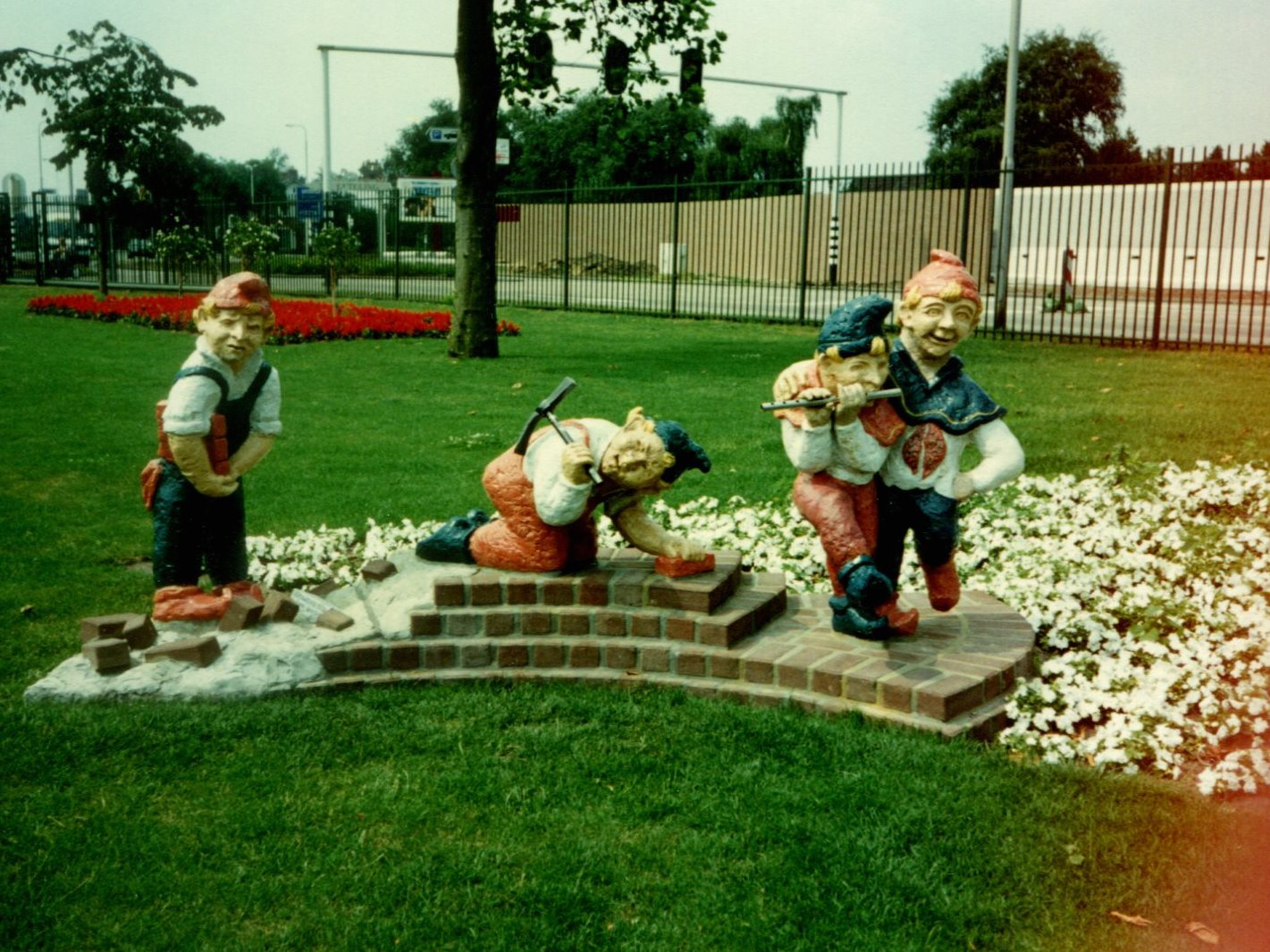 EftelingKaboutersParking